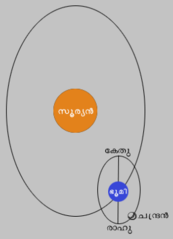 ഭൂമിയുടേയും ചന്ദ്രന്റേയും ഭ്രമണ പഥങ്ങൾ